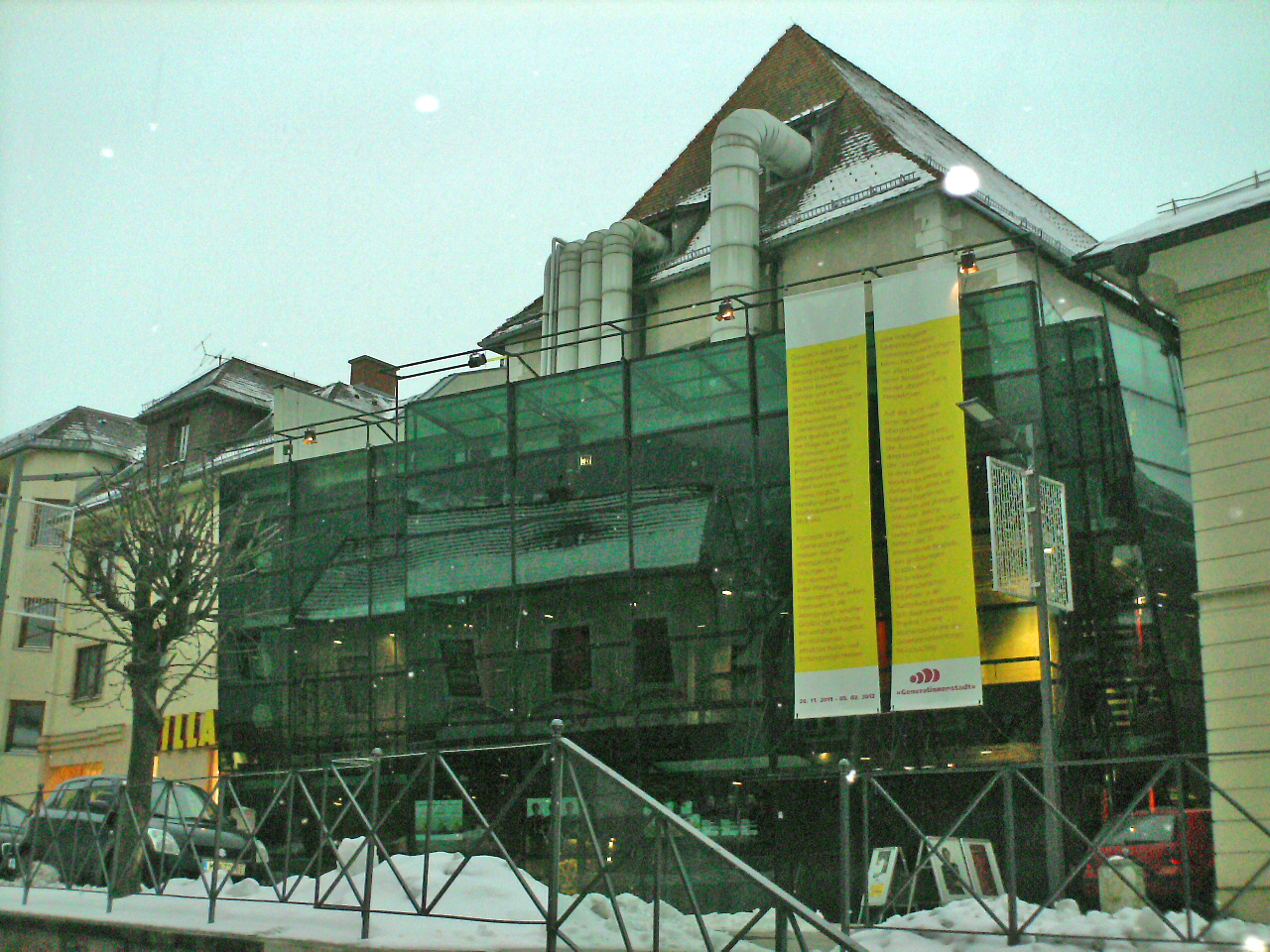 Kunsthaus Mürzzuschlag, ehemaliges Franziskanerkloster.